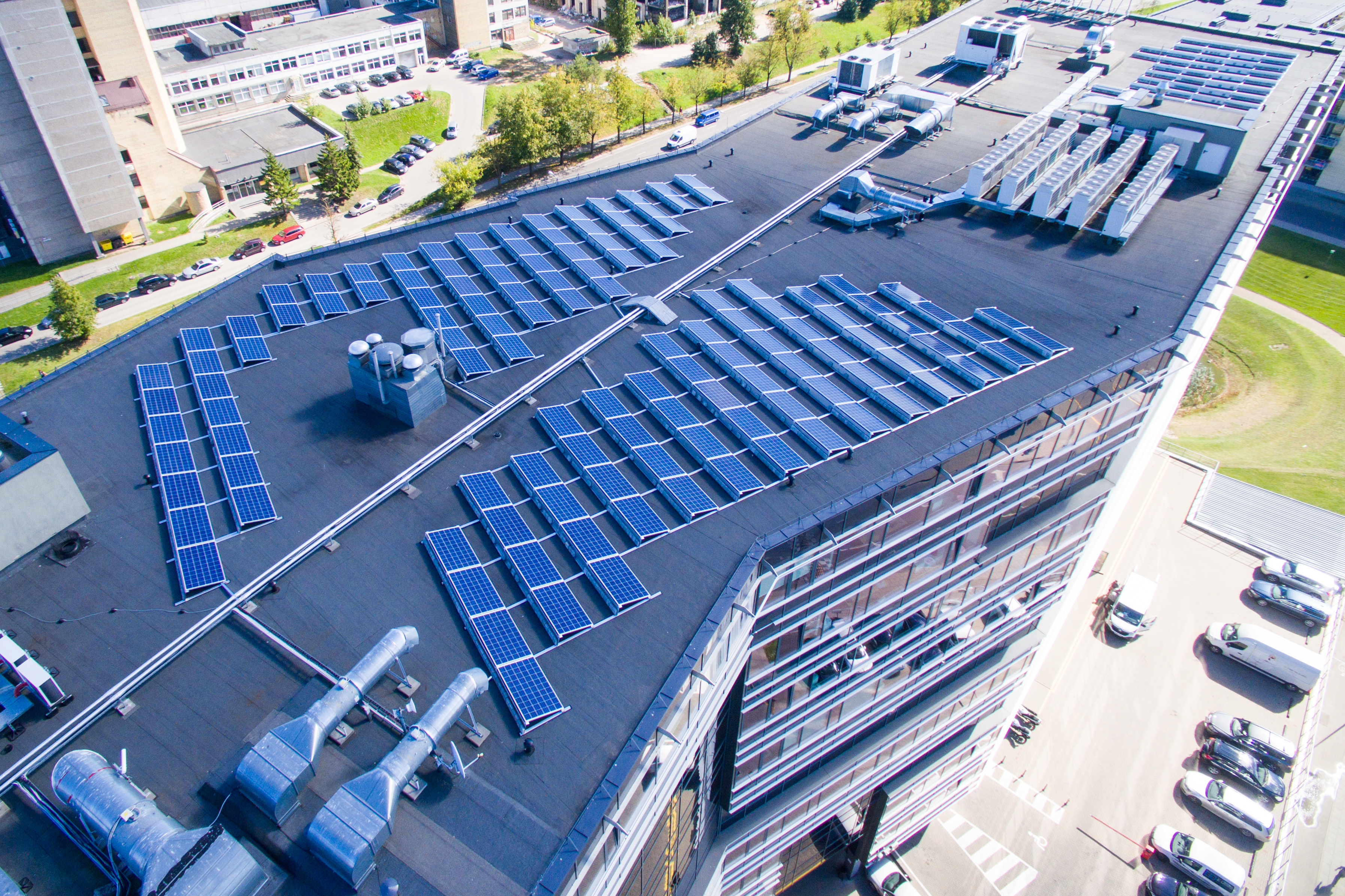 Saulės elektrinė ant verslo miestelio „Technopolis“ stogo